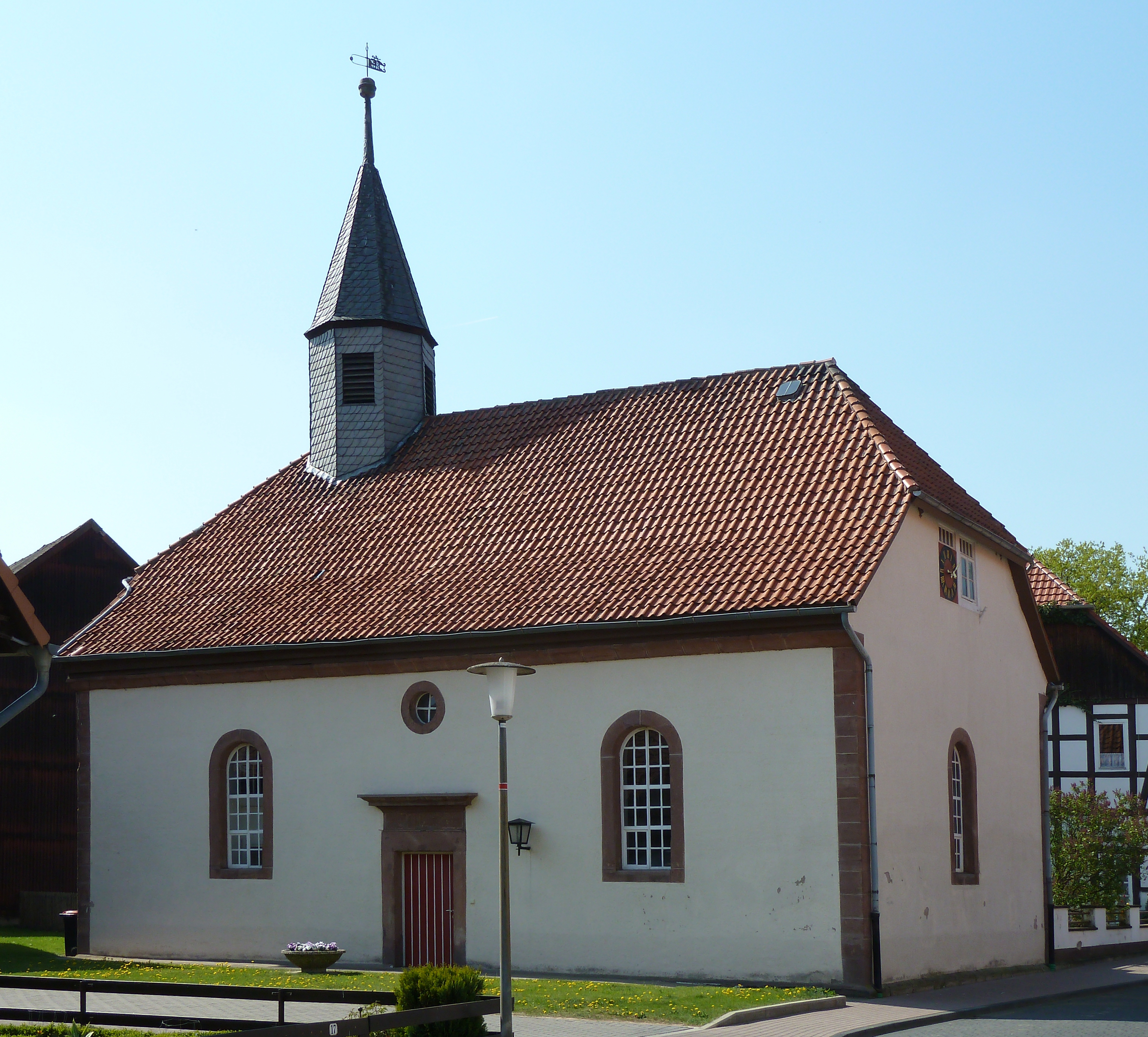 Ev.-ref. Kirche in Holzerode, Gemeinde Ebergötzen, Niedersachsen. Erbaut 1738